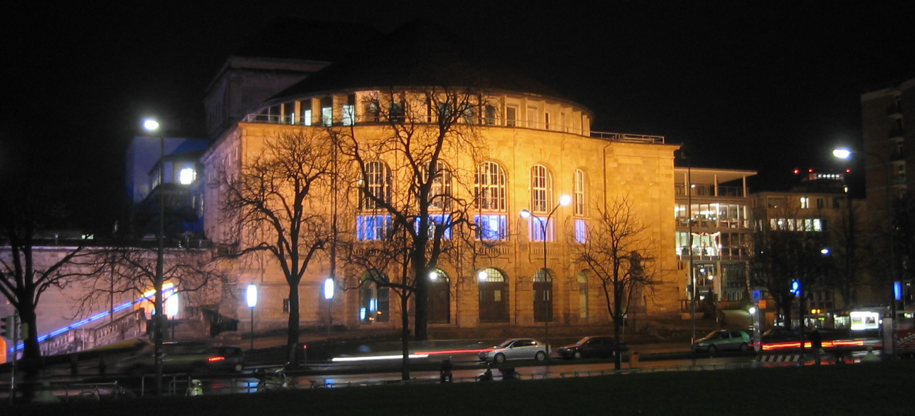 Stadttheater Freiburg im Breisgau nachts